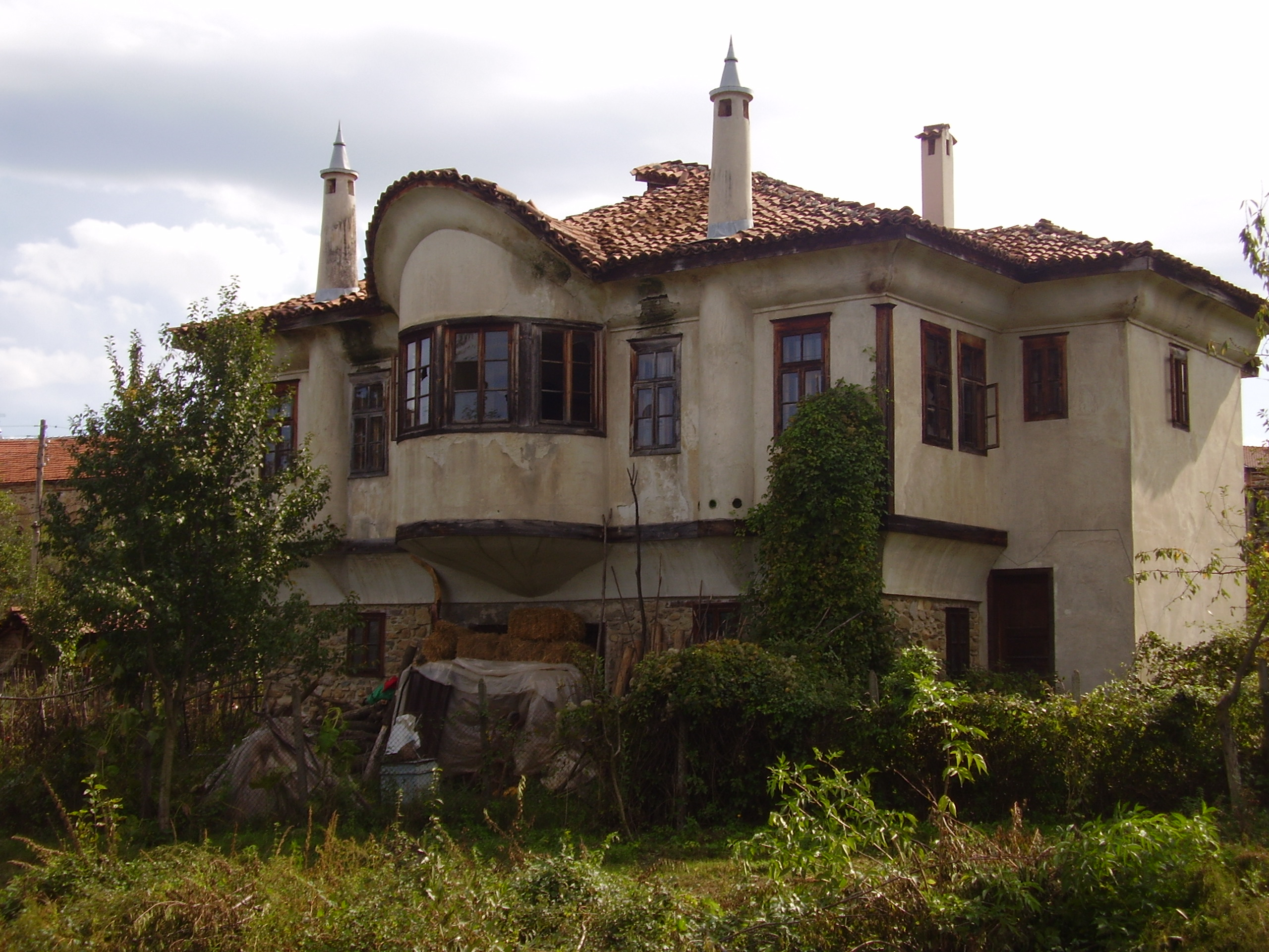 Границката къща - изглед откъм реката. Село Граница, България